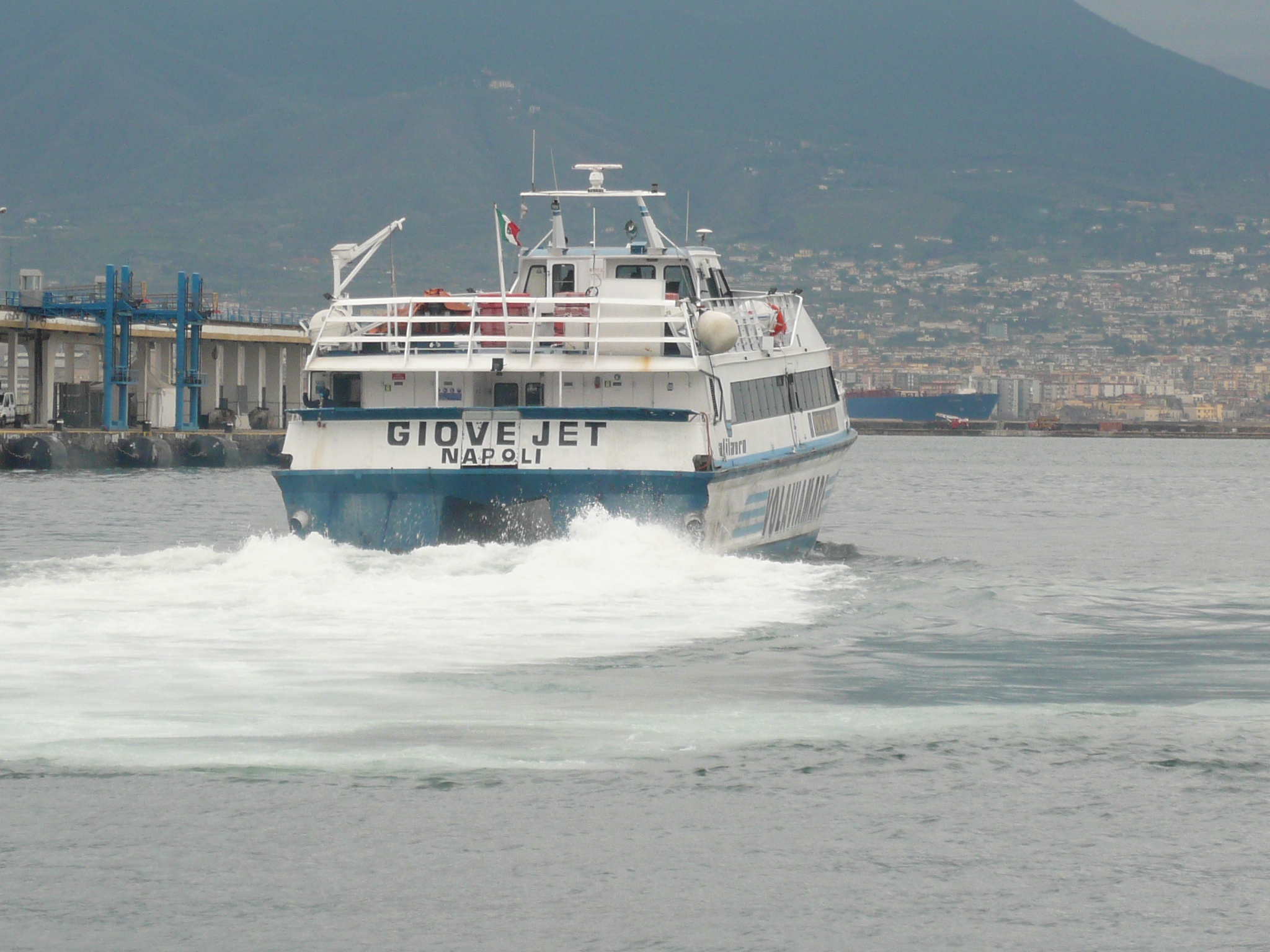 Catamarano in partenza da Napoli verso una delle isole del Golfo (Capri, Ischia e Procida). Sullo sfondo il Vesuvio e alle pendici di questo uno dei paesi vesuviani